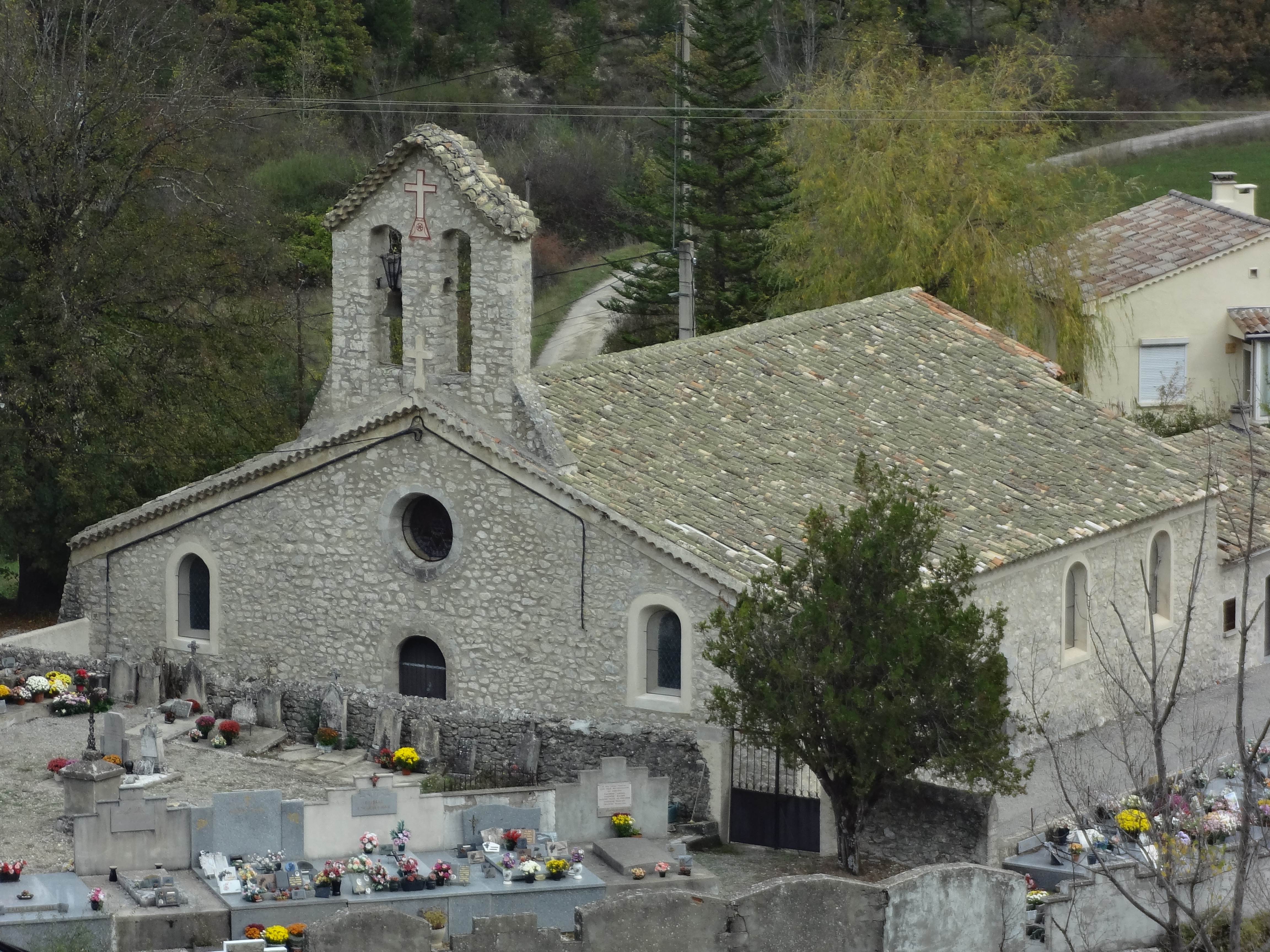 église Saint-Sauveur et cimetière